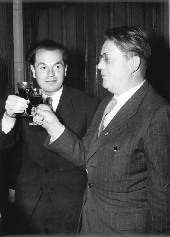 Zentralbild Weiß 1.10.1954 Abschiedempfang für ausländische Schriftsteller in Berlin Am 30.9.1954 fand im Hotel Johannishof, Berlin, ein Abschiedsempfang für polnische, tschechoslowakische, französische und albanische Schriftsteller statt, die sich längere Zeit in der Deutschen Demokratischen Republik aufgehalten hatten. UBz: Kurt Bartel (Kuba) und Kundera, CSR, (links).